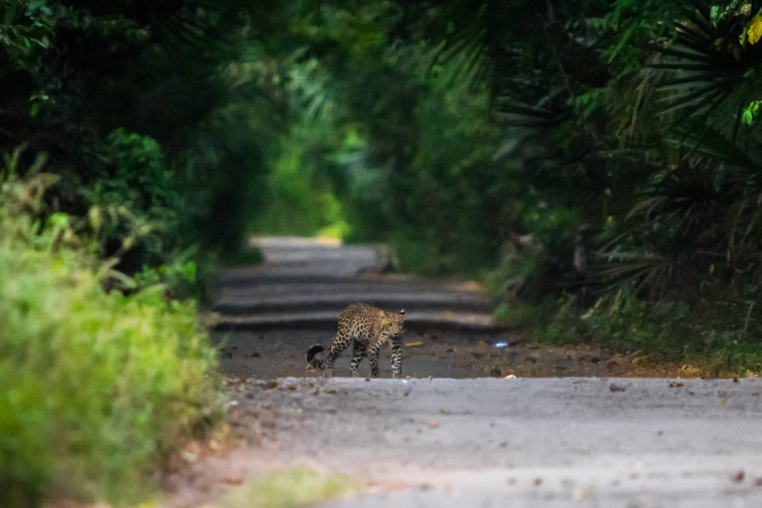 seekor macan tutul jawa ( Panthera pardus melas ) melintasi daerah evergreen di taman nasional baluran